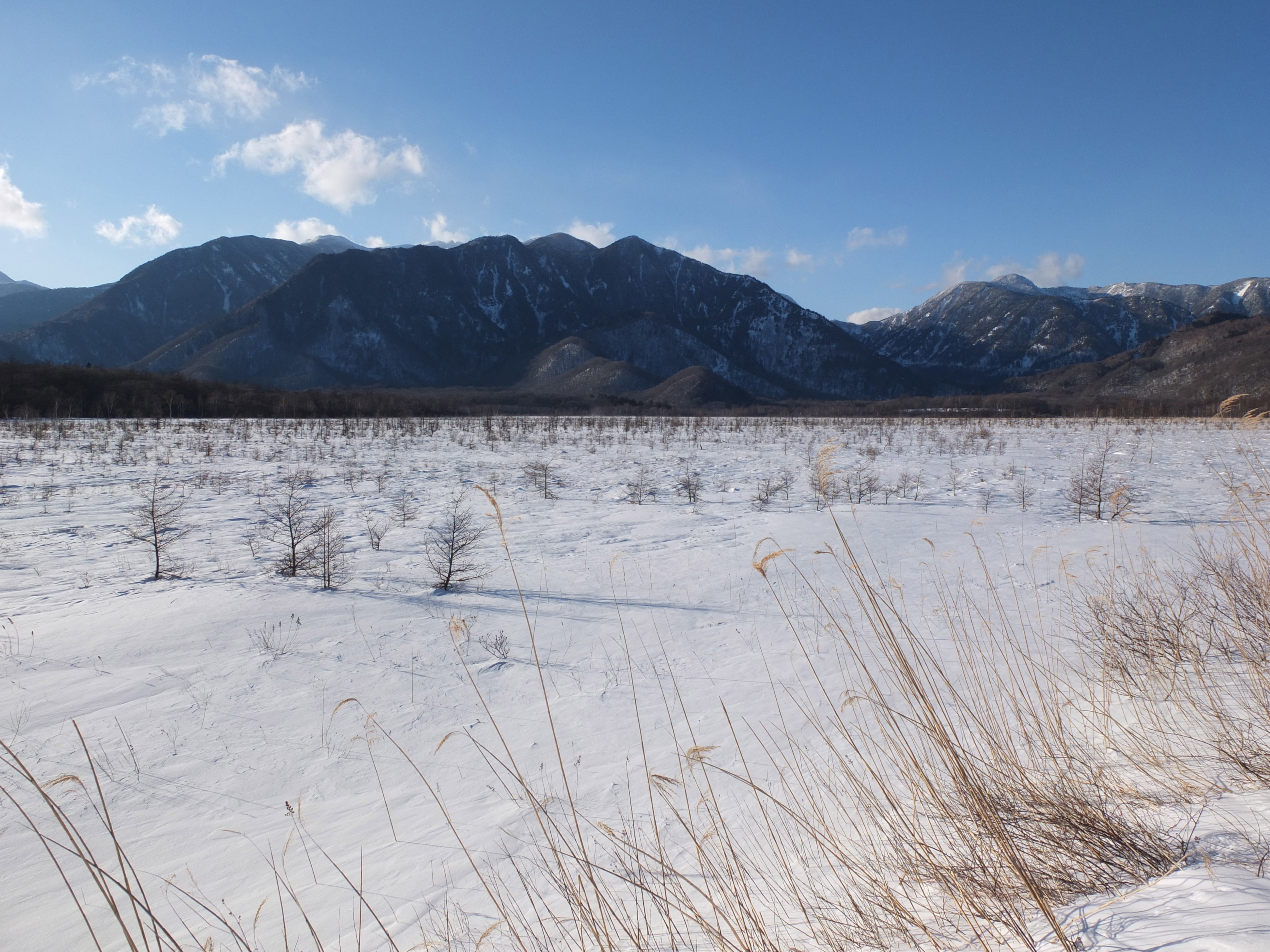 ２月の戦場ヶ原